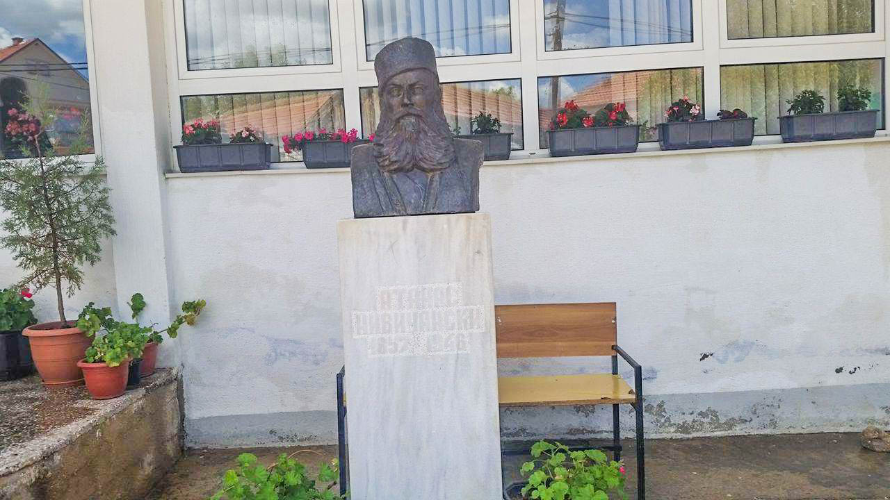 Основно училиште „Атанас Нивичански“ - Нова Маала